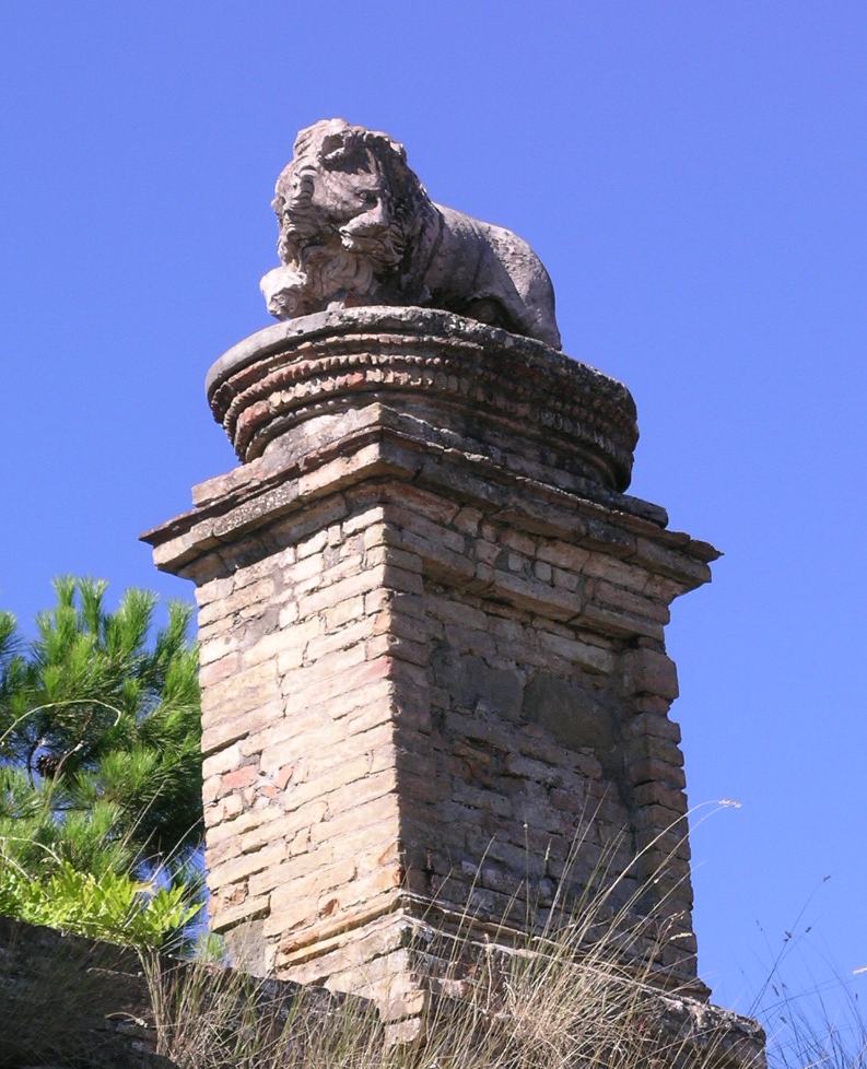 Portale del Leone di Galeazzo Alessi, Perugia (dettaglio Leone)